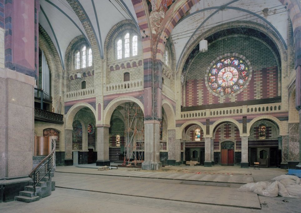 Sint Lambertuskerk: Interieur, overzicht richting het noordelijk transept, overzicht zonder kerkbanken, dit i.v.m. de herbestemming van de kerk tot kantoor (opmerking: Kerk wordt herbestemd tot kantoor)